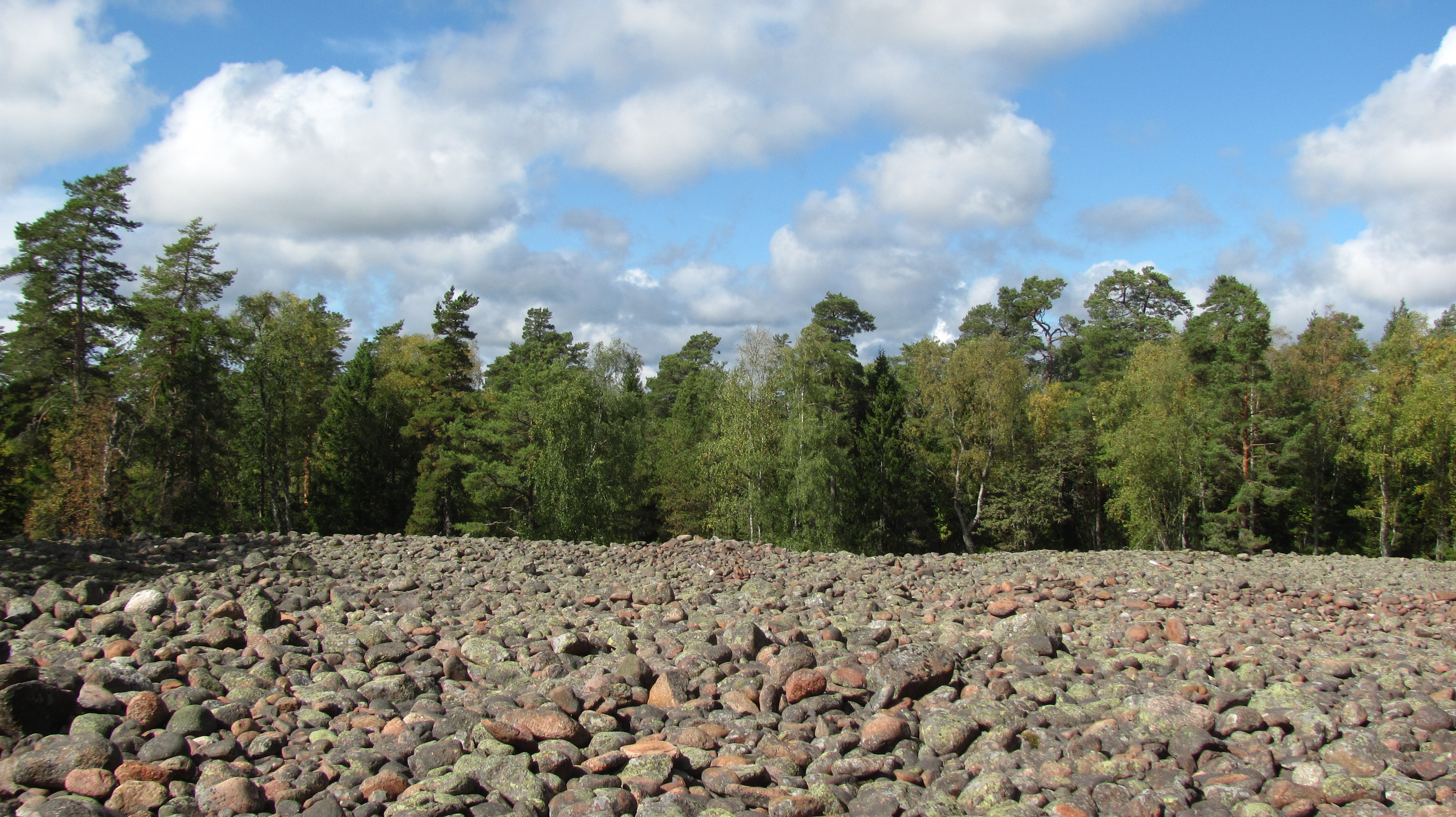 Eiszeitliches Geröllfeld Knapplarna" bei Jomala, Fasta Aland, Finnland.